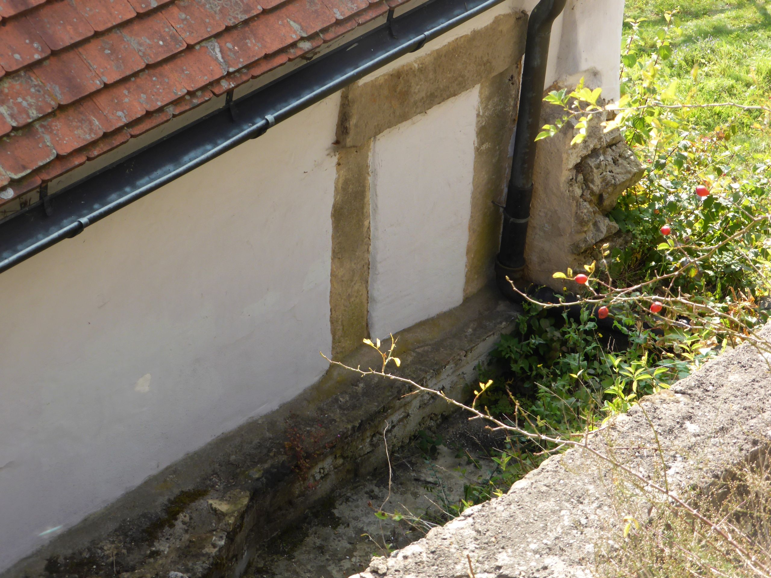 Wolfsegg (Hohenwarth)